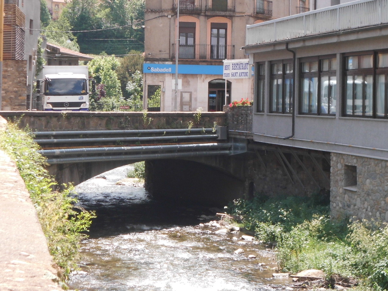 Pont de Ribes (Ribes de Freser)